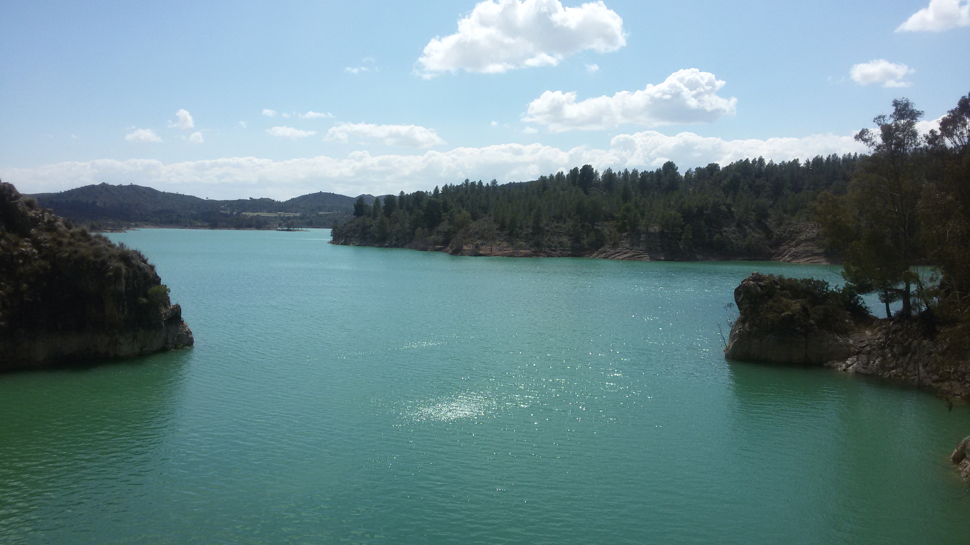 Presa del embalse